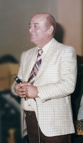 Cantante Libanés Nasri Shamseddin